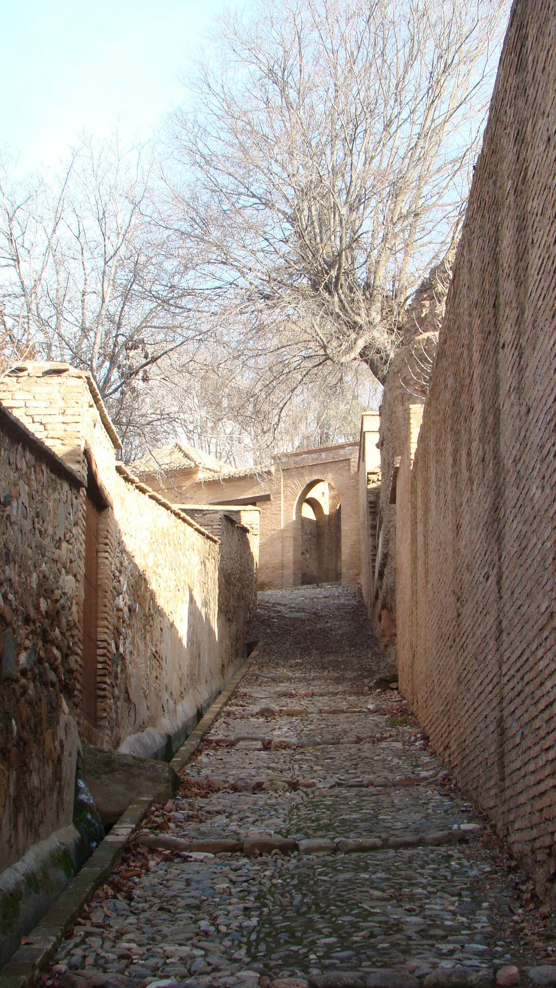 Tramo ingerior del camino medieval que daba acceso al Generalife desde la Cuesta de los Chinos y la Alhambra